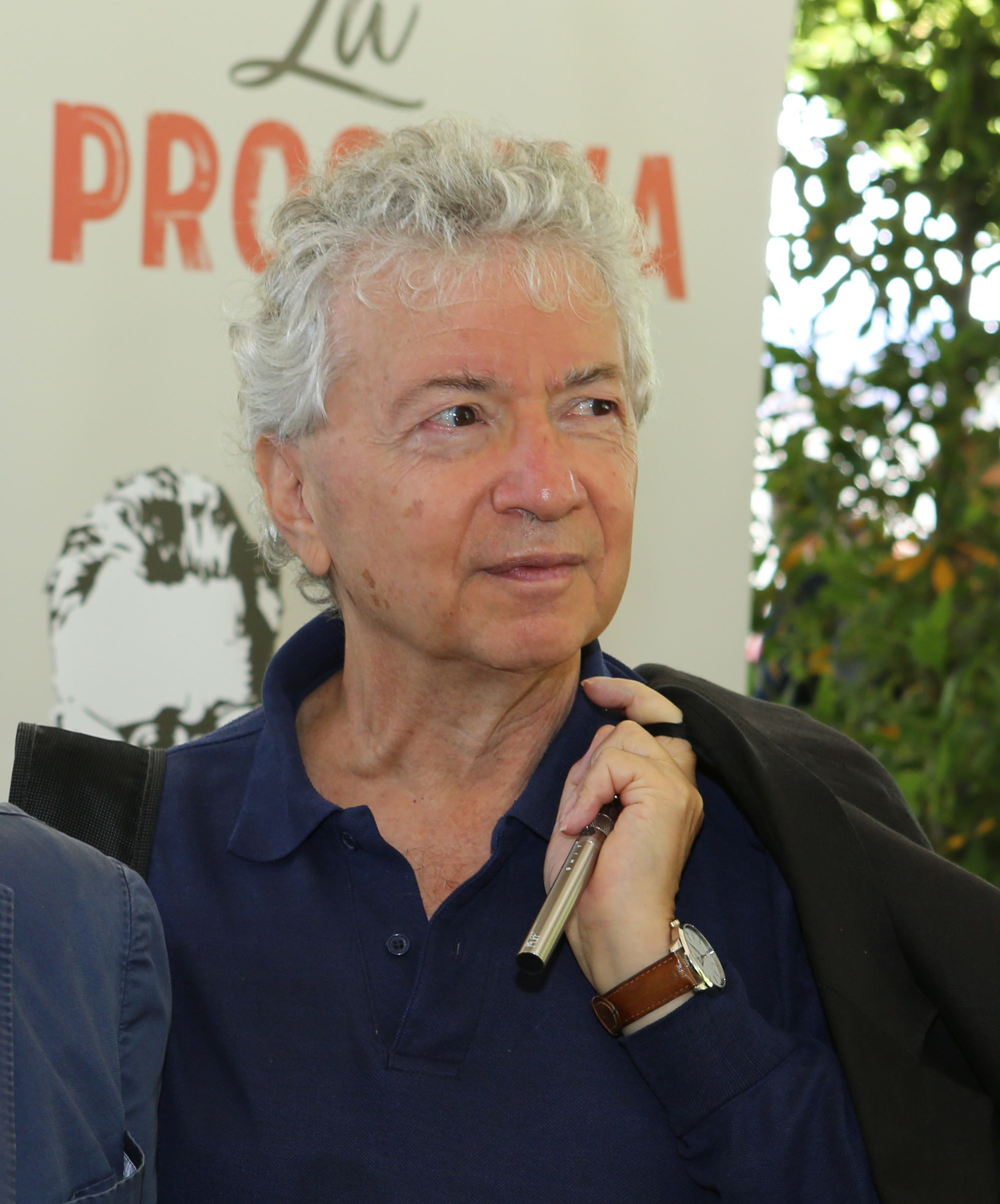 Donald Sassoon alla quinta festa della rivista Left Wing a Fiuggi, nel 2017